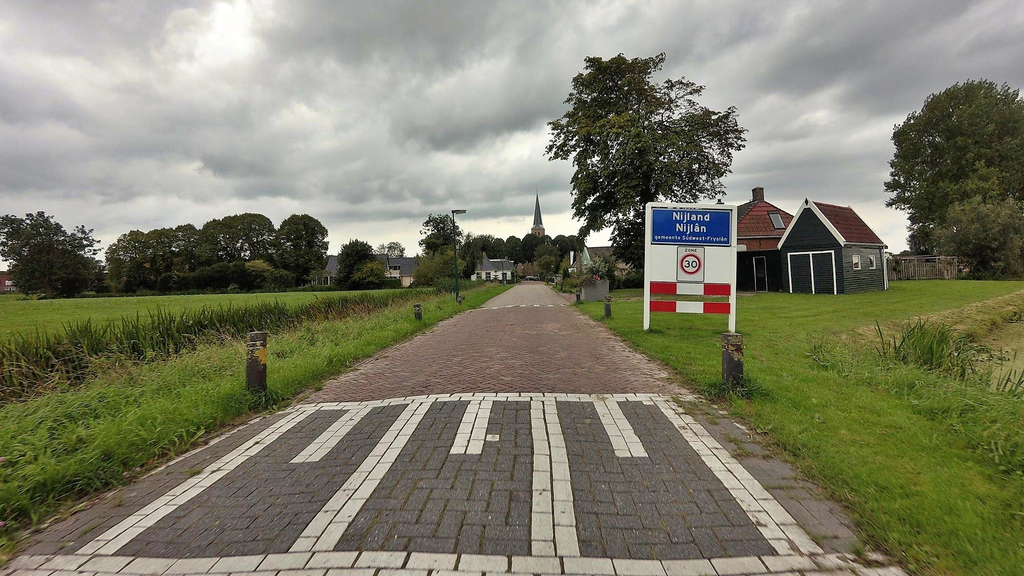 Nijland oost